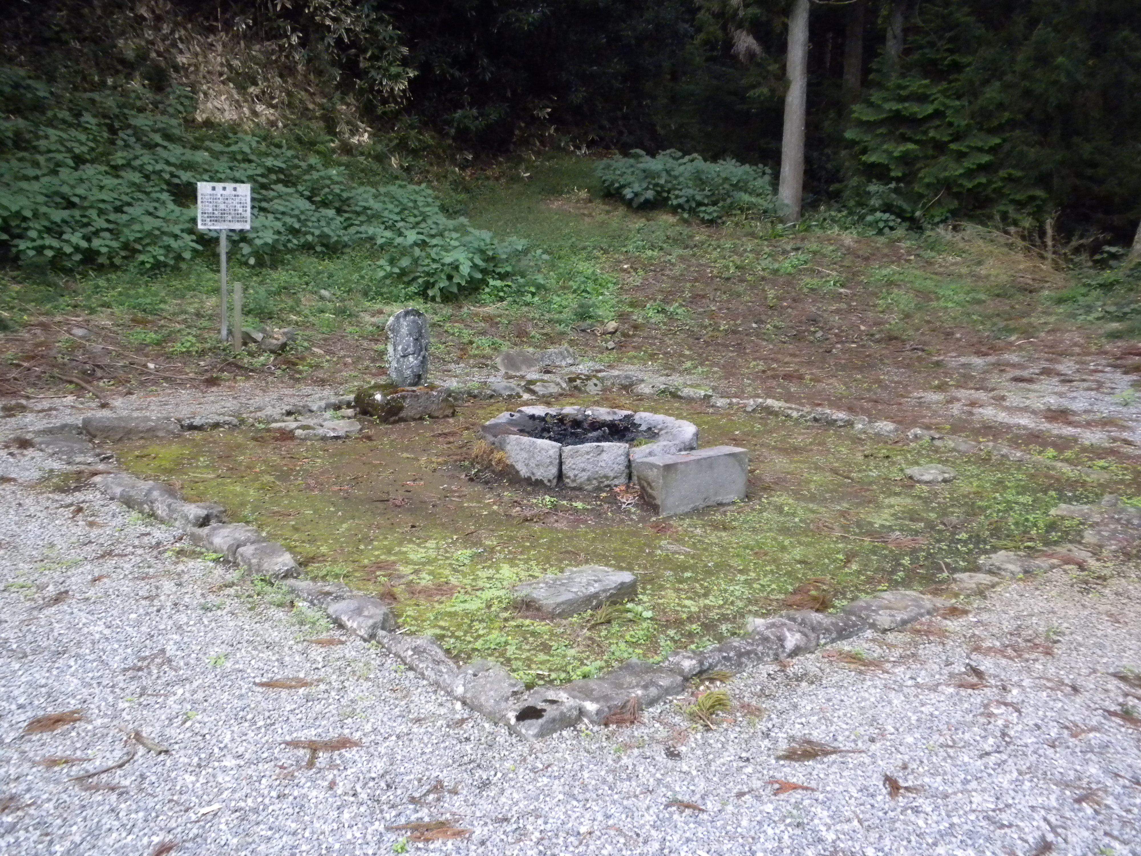 村山浅間神社（静岡県富士宮市）境内の護摩壇